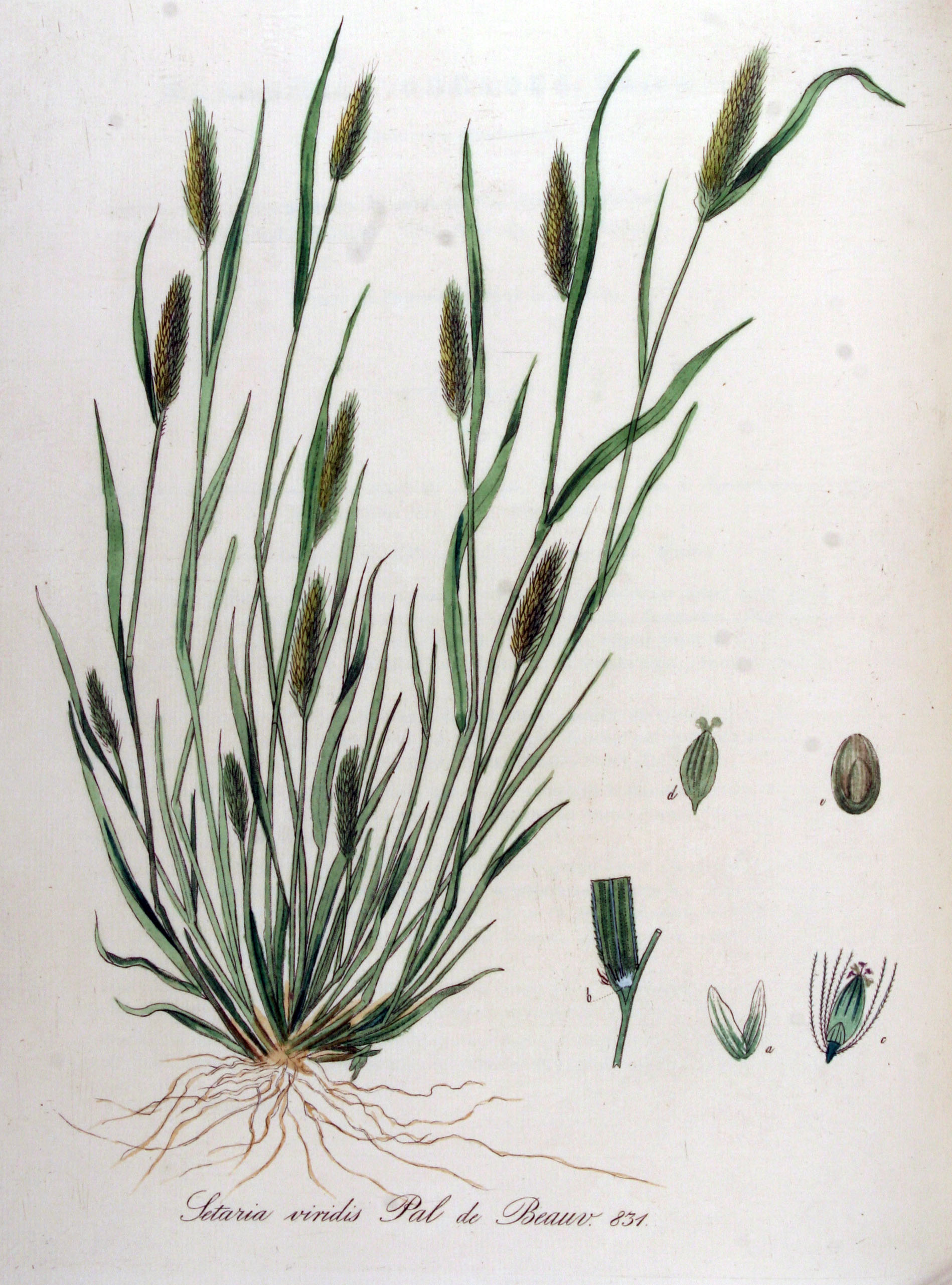 Setaria viridis (L.) Beauv.